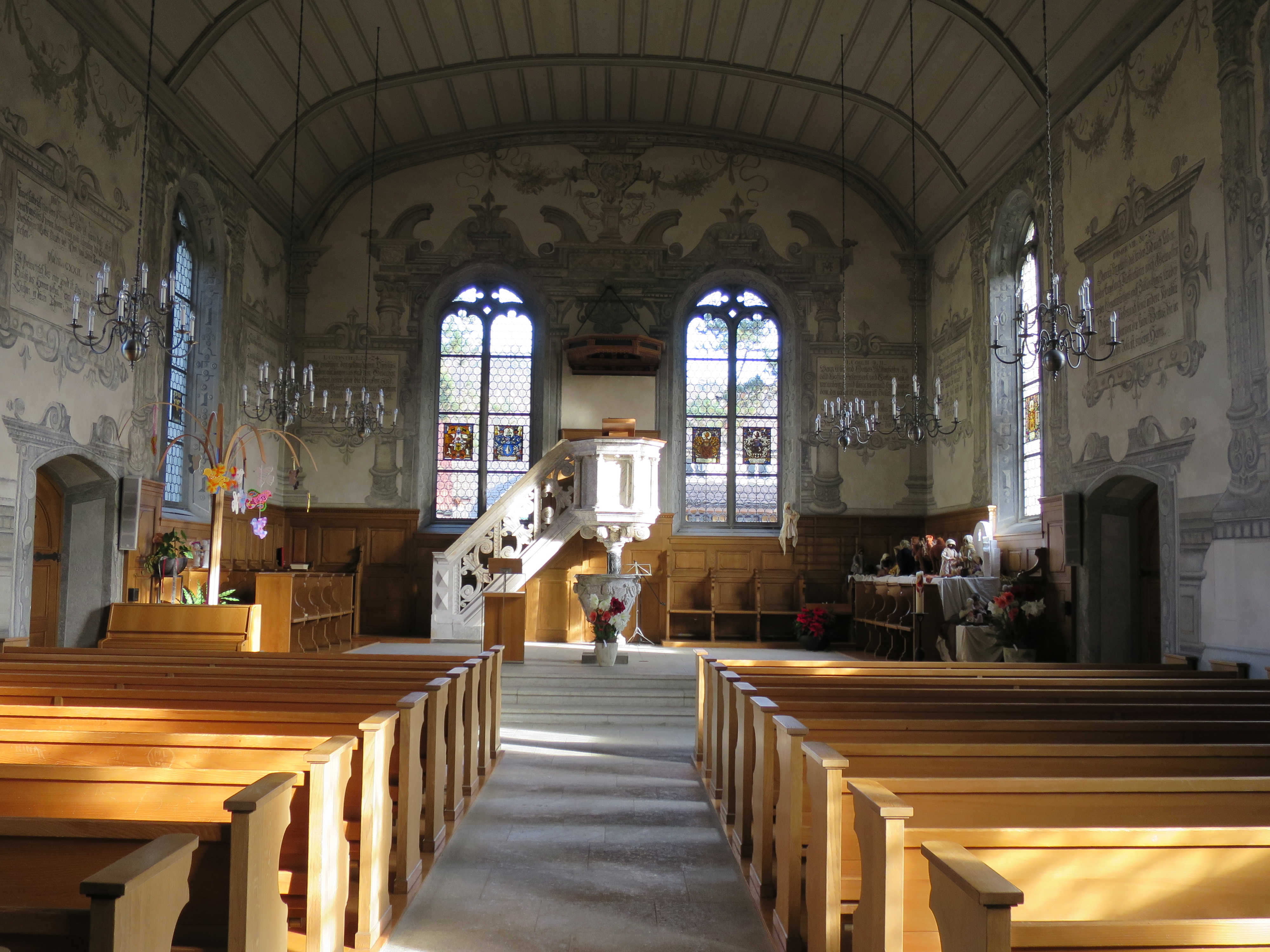 Innenraum der reformierten Kirche Gränichen